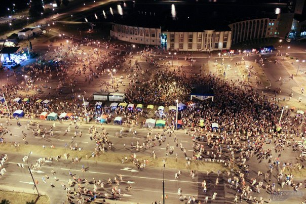 День города 2012 (Гребной канал)